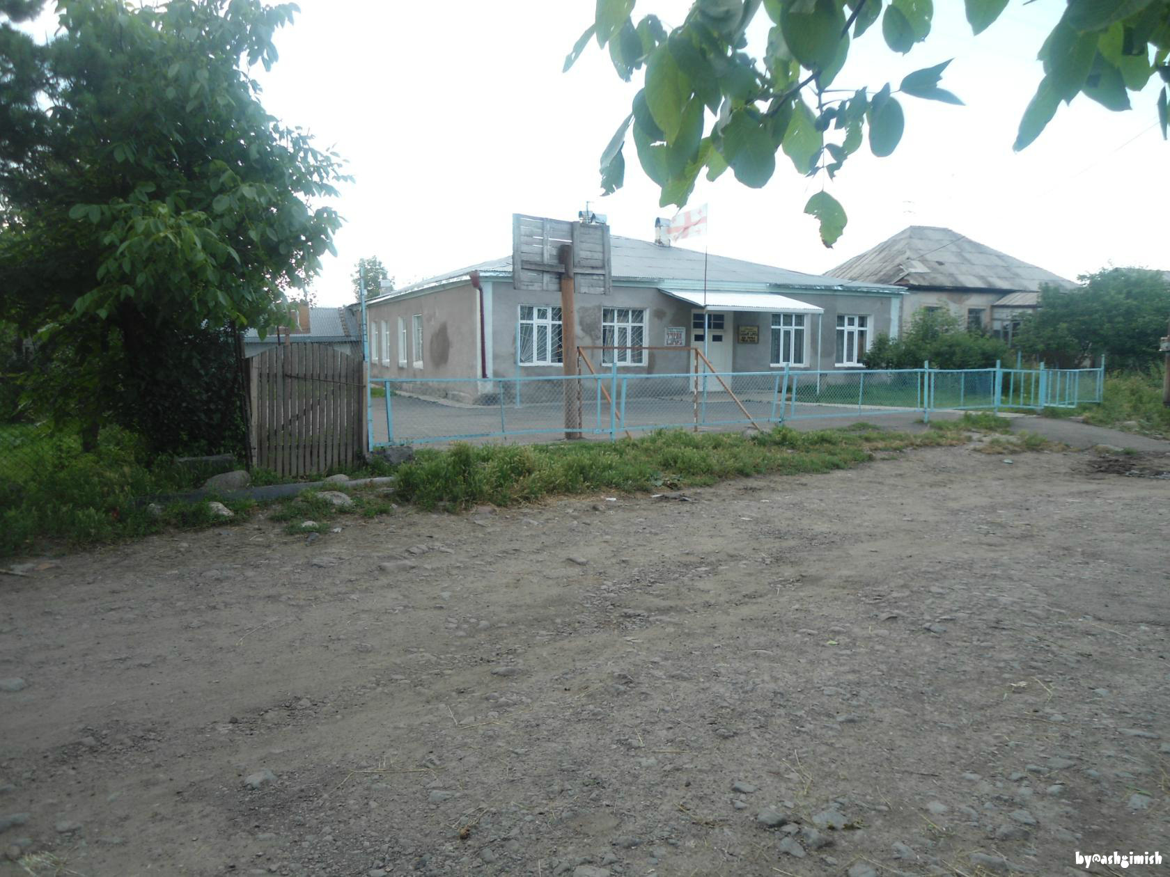 Գյուղի միջնակարգ դպրոցը